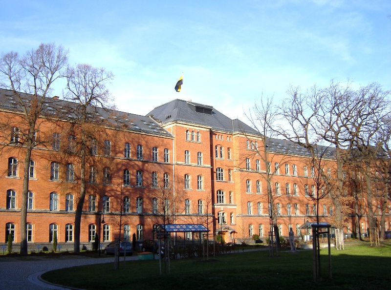 Magdeburg-Brückfeld, Ministerium für Gesundheit und Soziales